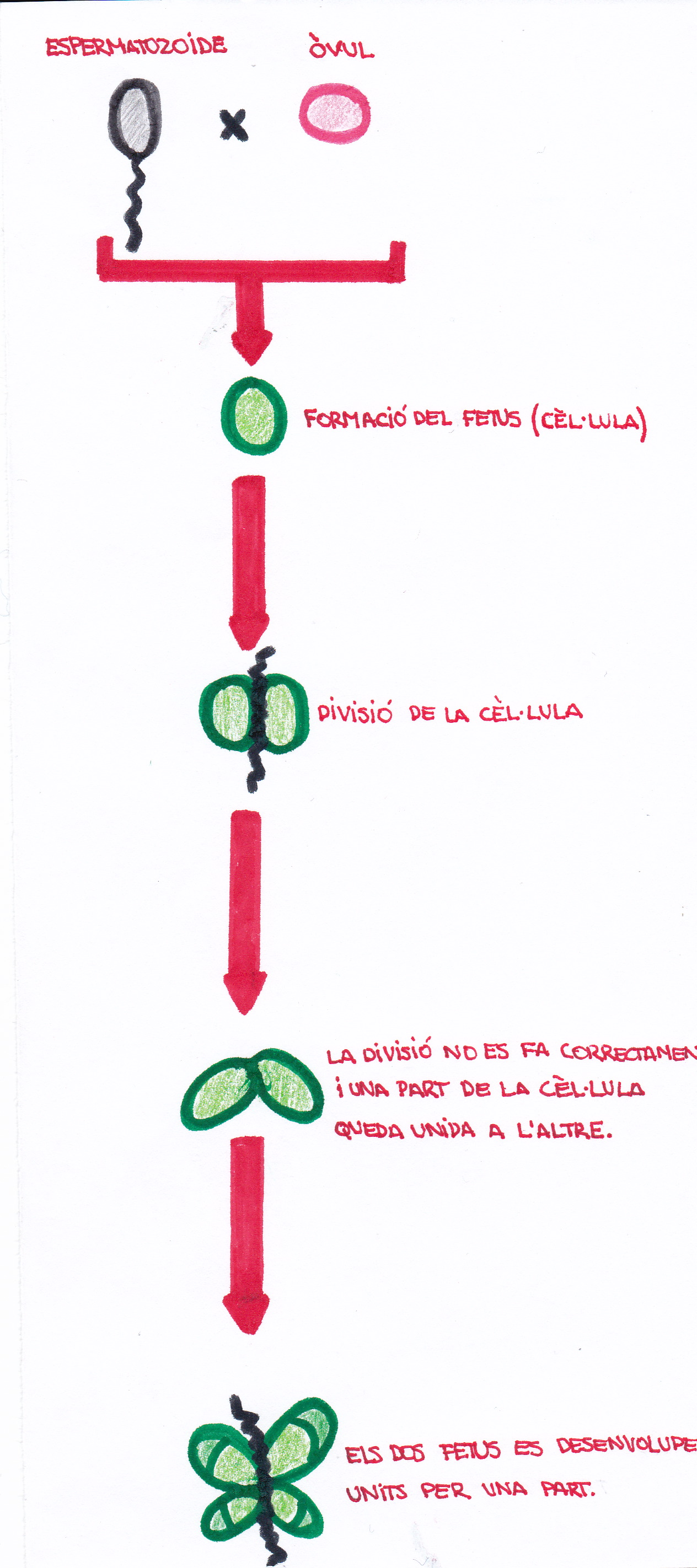 Com s'esdevé a siamesos?